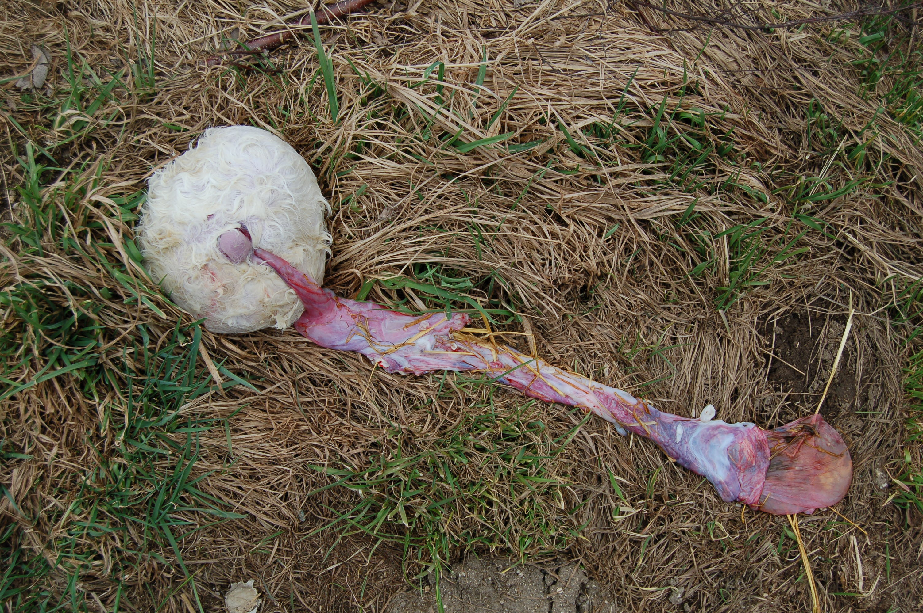 Zwillingsmissbildung bei Fleckviehkuh, nabelseitig, Übersicht